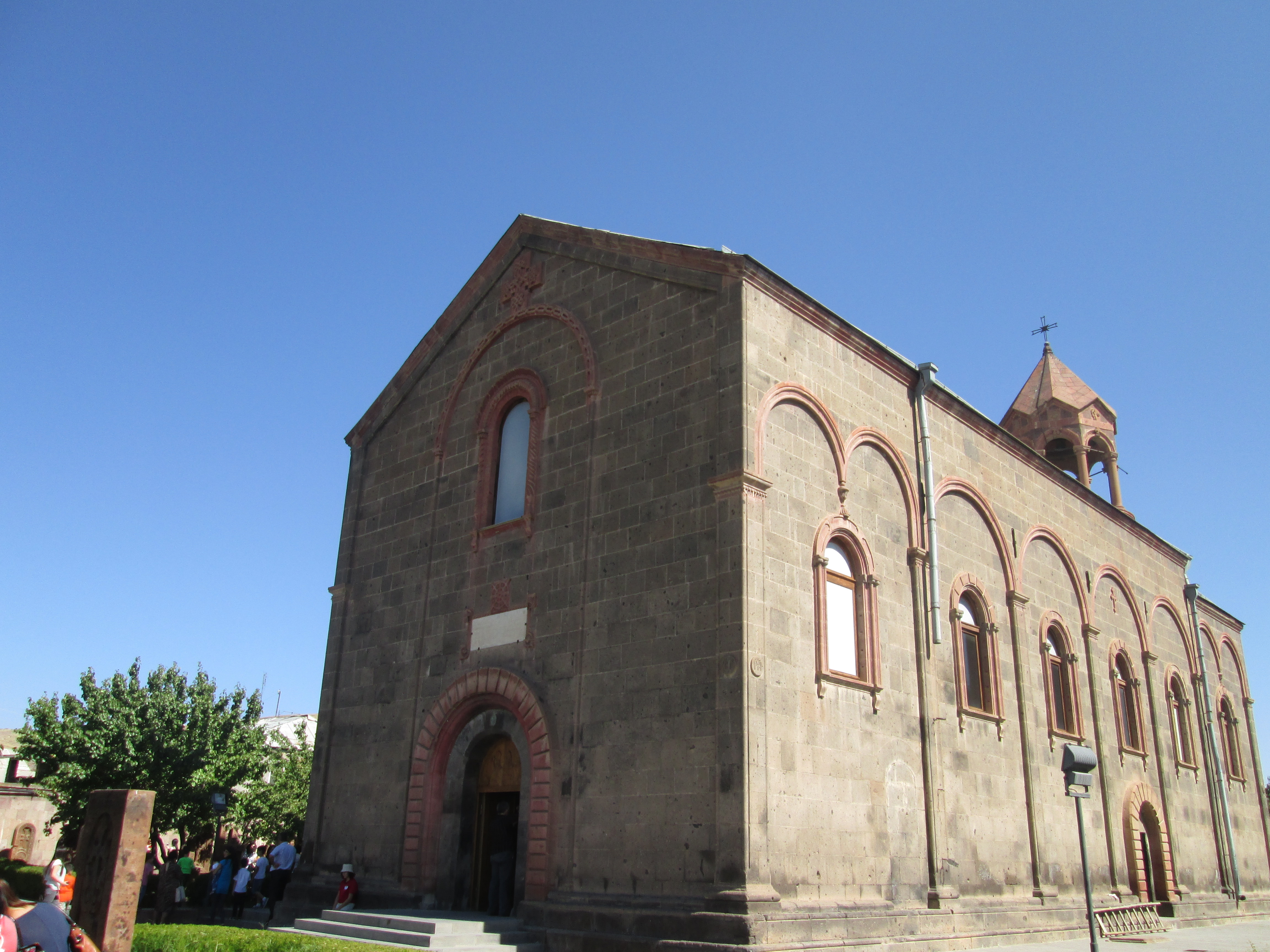 Եկեղեցի Մեսրոպ Մաշտոց 113/22